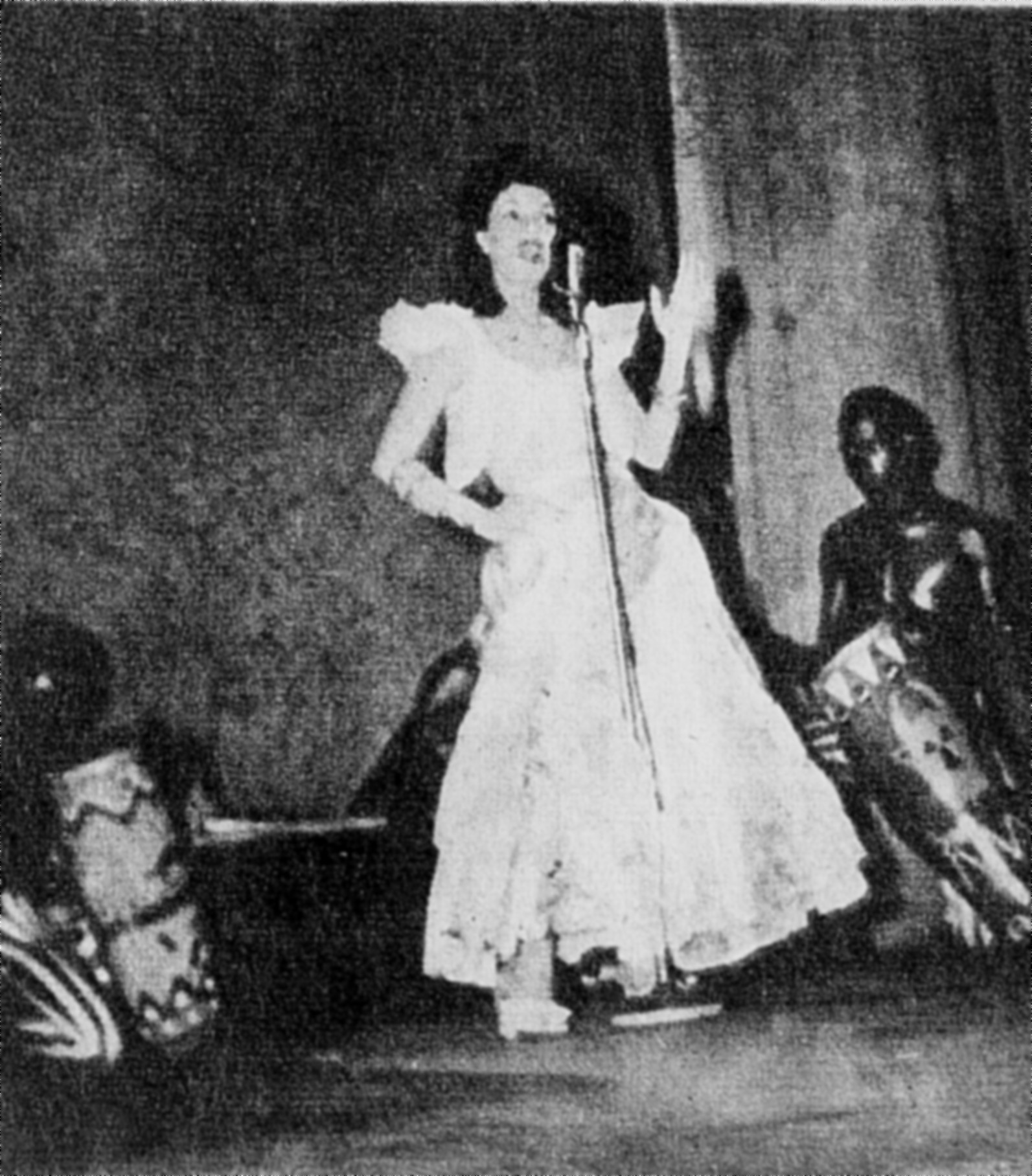 A atriz, cantora e vedete brasileira Elvira Pagã, em fotografia publicada em 1944 pela revista "Carioca", representando cena de "Quando a Noite Vem Descendo" (possivelmente uma peça de teatro de revista).